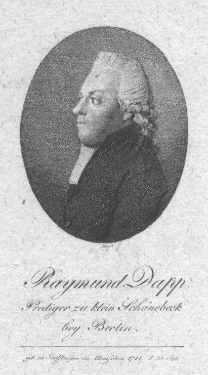 Raymund Dapp, Prediger von Klein-Schönebeck, Schöneiche und Münchehofe; Punktierstich, 74x57 cm; aus Neue allgemeine deutsche Bibliothek. 37. Bd. 1. Stück. - 1798. - Frontispiz